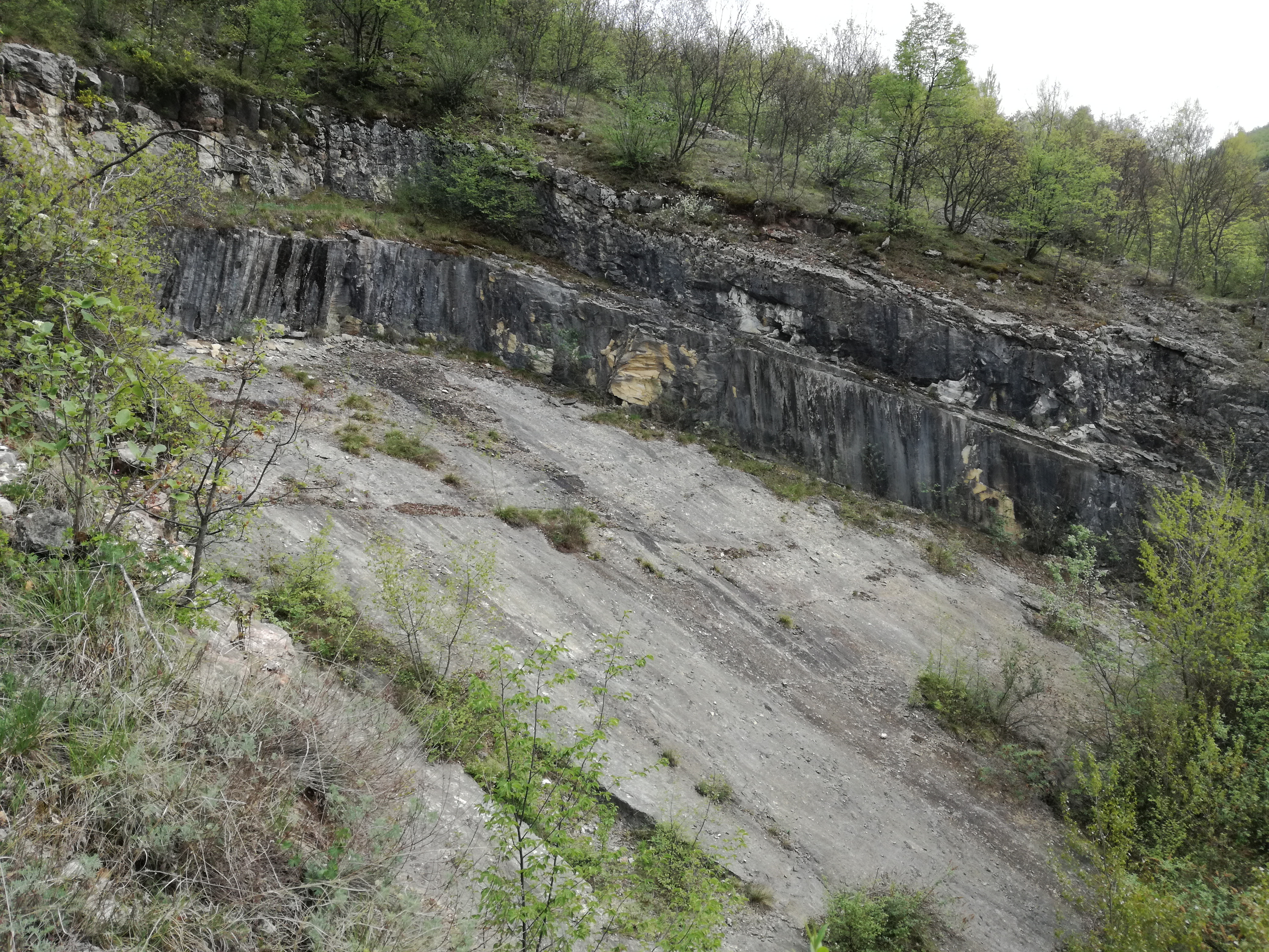 aufgelassener Marmorsteinbruch am Monte Giovo bei Castione (Brentonico – Trentino)